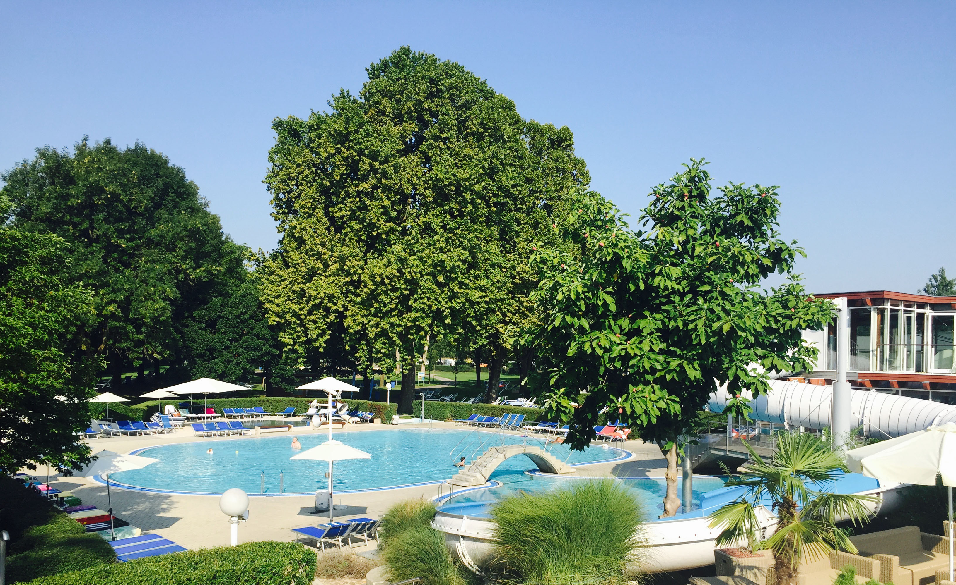 Der Erlebnisbereich für Kinder befüllt mit 32-34 Grad Süßwasser umfasst einen Innen und Außenbereich mit Wasser-Rutsche, Sprudeln und einen Wildwasserbach. Auch zwei Kleinkinder-Becken stehen für die Gäste zur Verfügung.